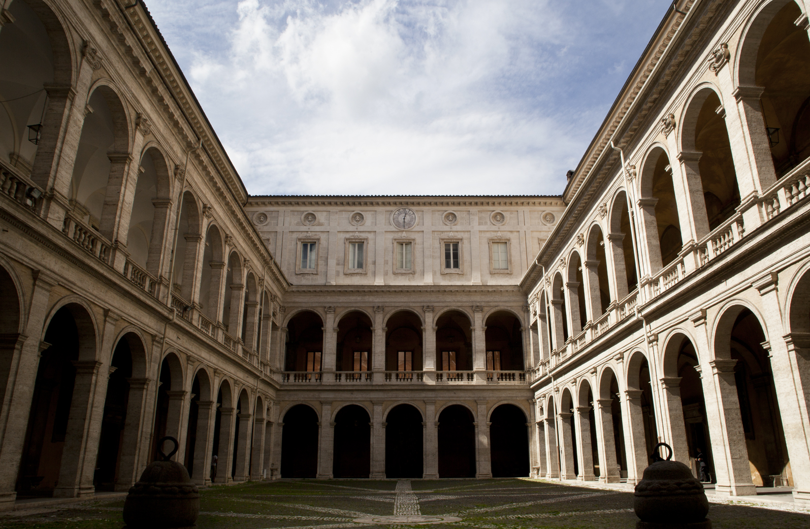 Archivio Centrale dello Stato - MIBAC This is a photo of a monument which is part of cultural heritage of Italy.